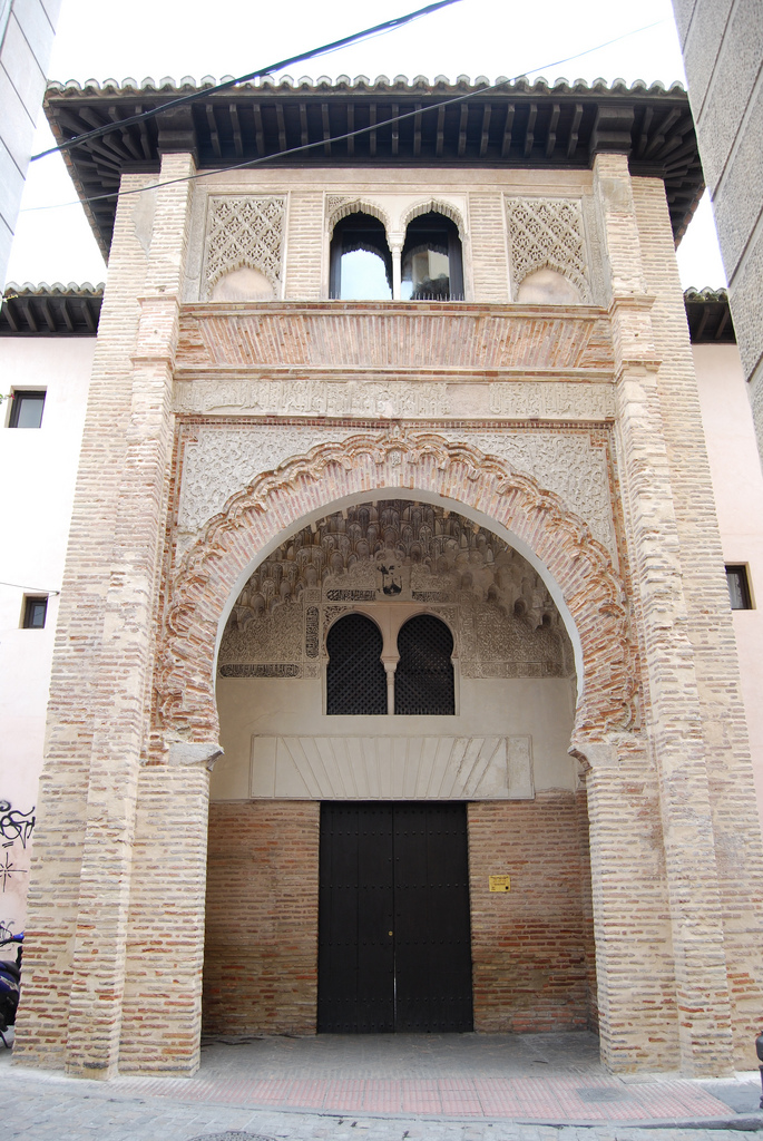 Fachada del Corral del Carbón en Granada (España). Front of the Corral del Carbón in Granada (Spain).